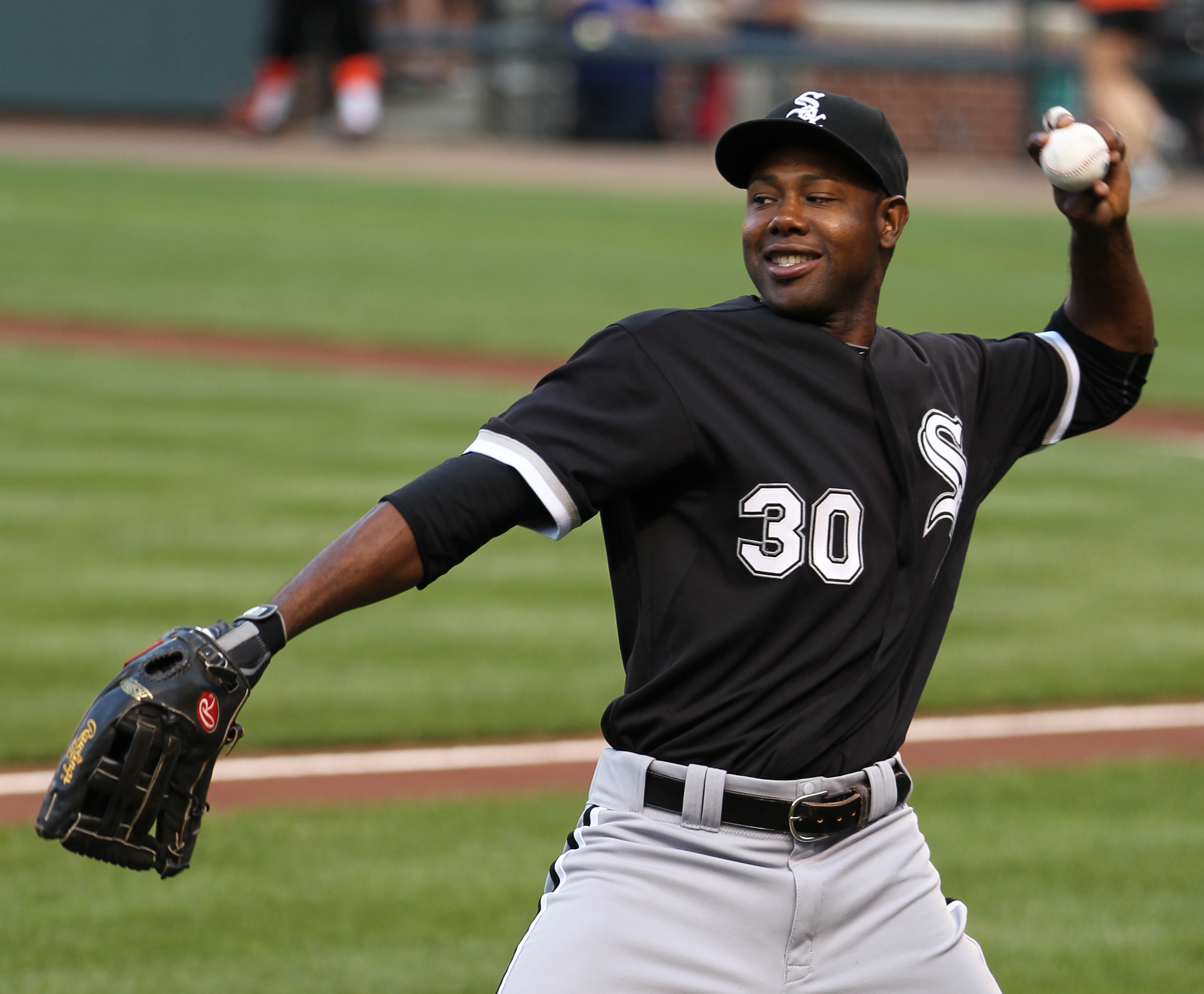 Alejandro De Aza